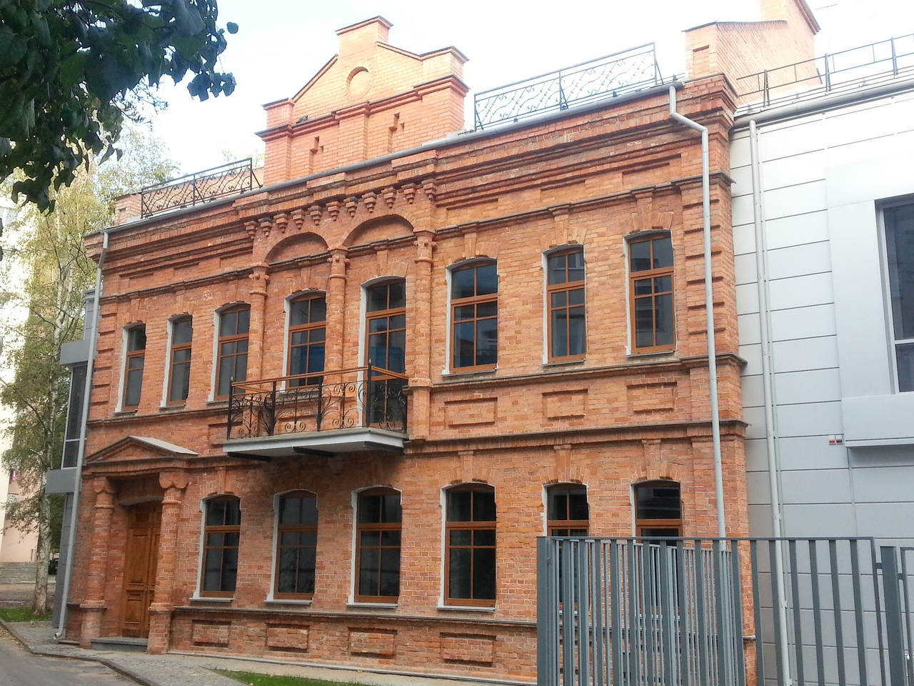 Беларуская (тарашкевіца): Забудова вул. Леніна. г. Віцебск This is a photo of Belarusian heritage monument. Reference number: 213Г000049 ( WLM)